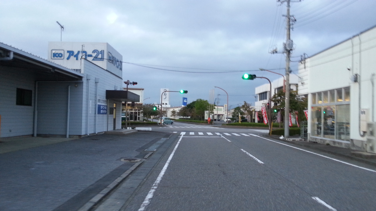 土浦市卸町